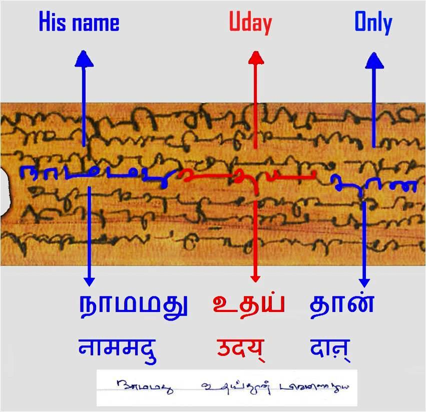 एका नाडीपट्टीत उदय नामक व्यक्तिचे कोरून लिहिलेले नाव